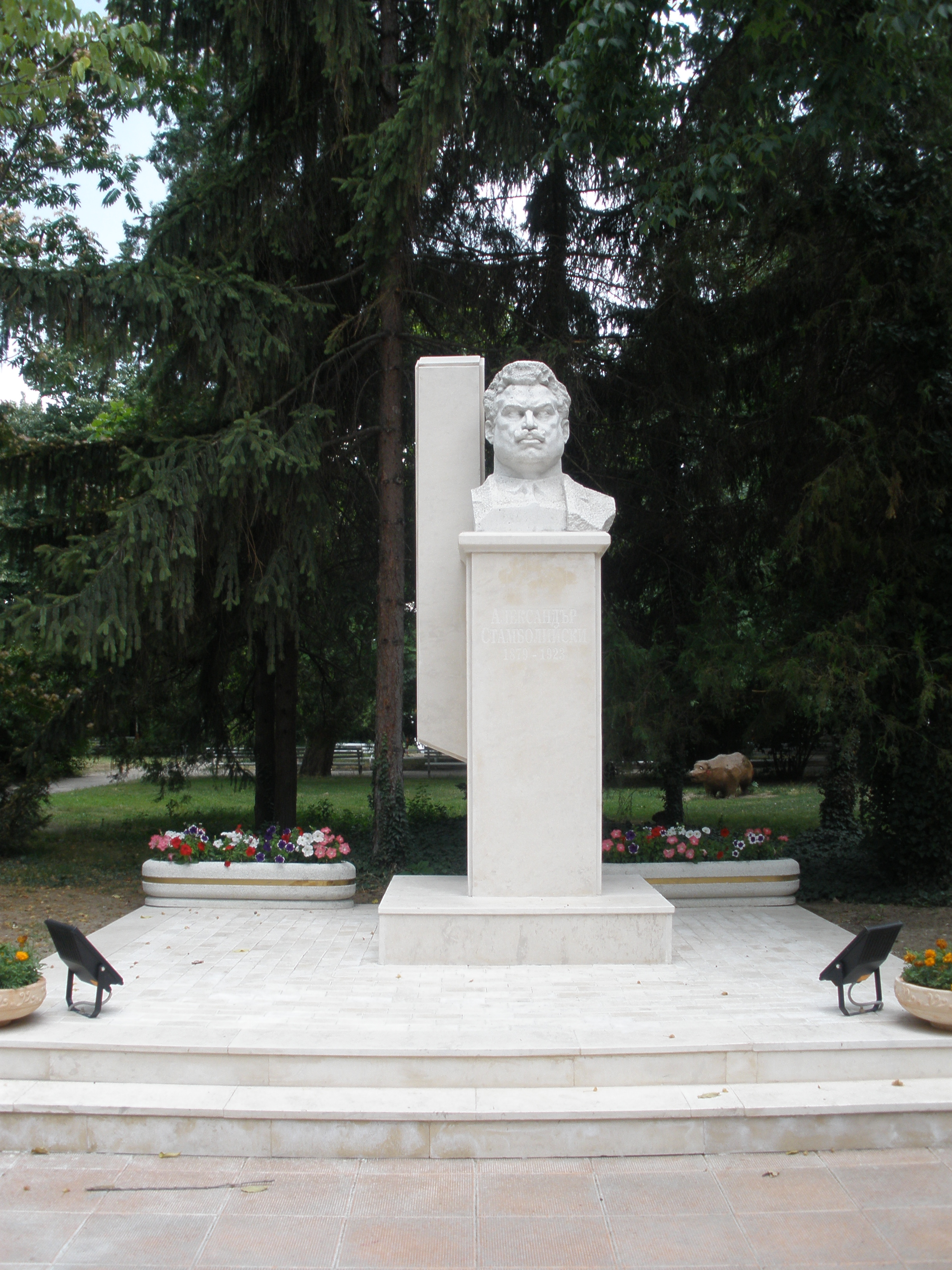 Паметник на Александър Стамболийски в град Стамболийски.